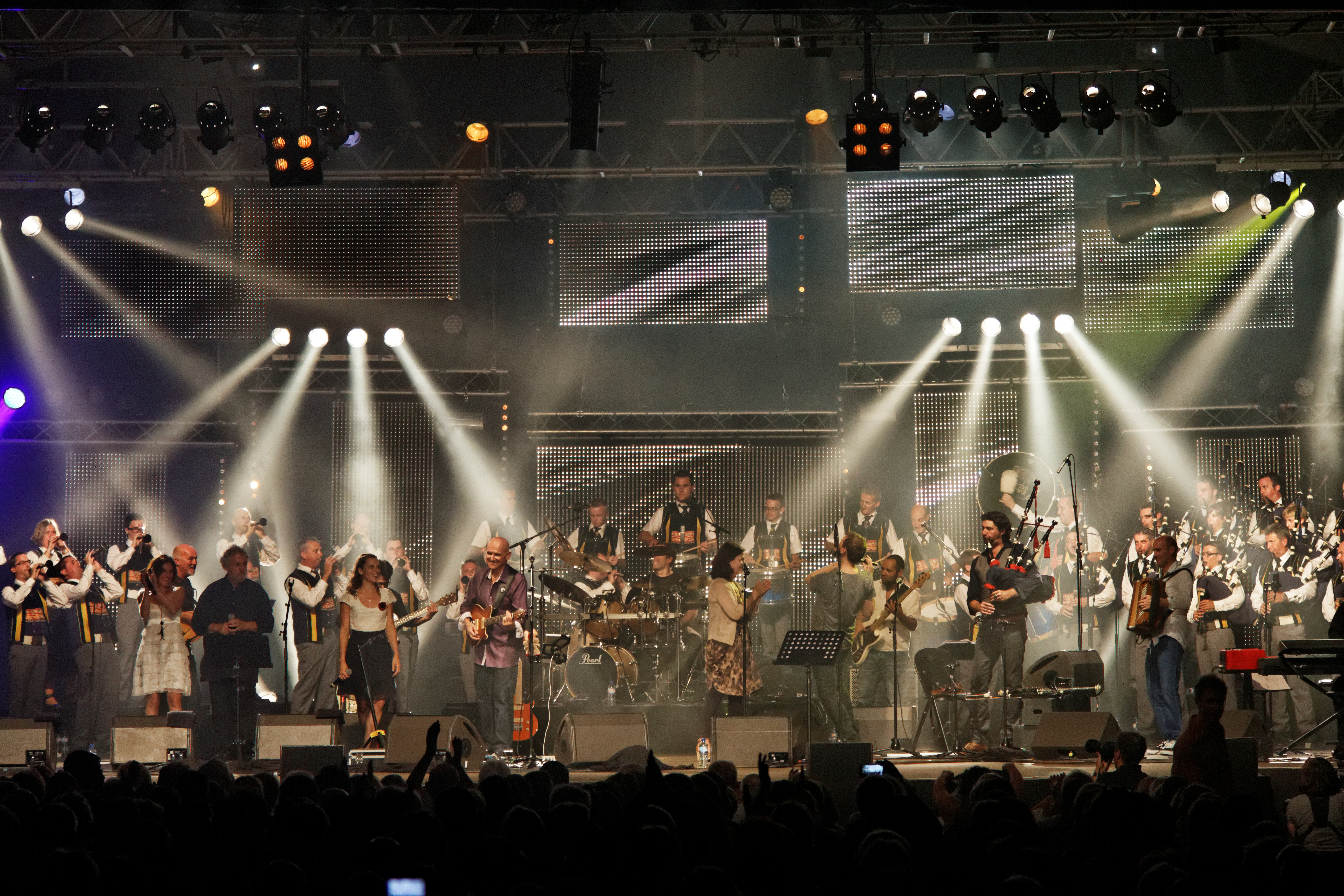 Dan ar Braz en concert sur la scène Gradlon lors du festival de Cornouaille 2013.